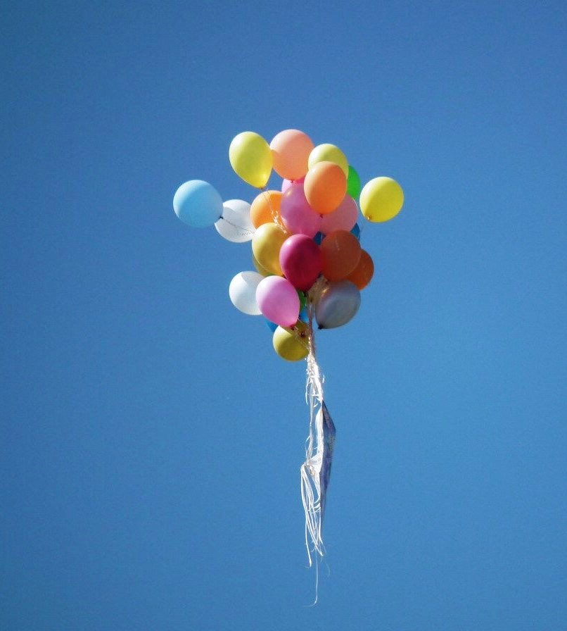 Toy balloon in the sky of Eastern Siberia